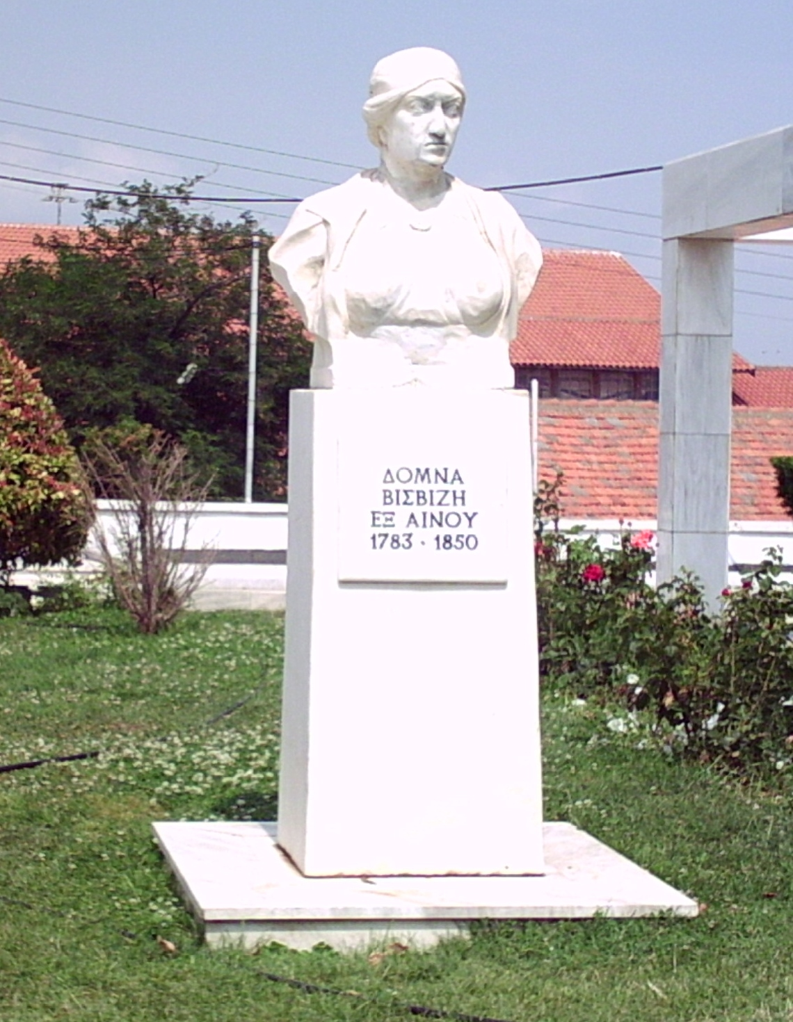 Προτομή της Δόμνας Βισβίζη , στην πλατεία Φάρου Αλεξανδρούπολης